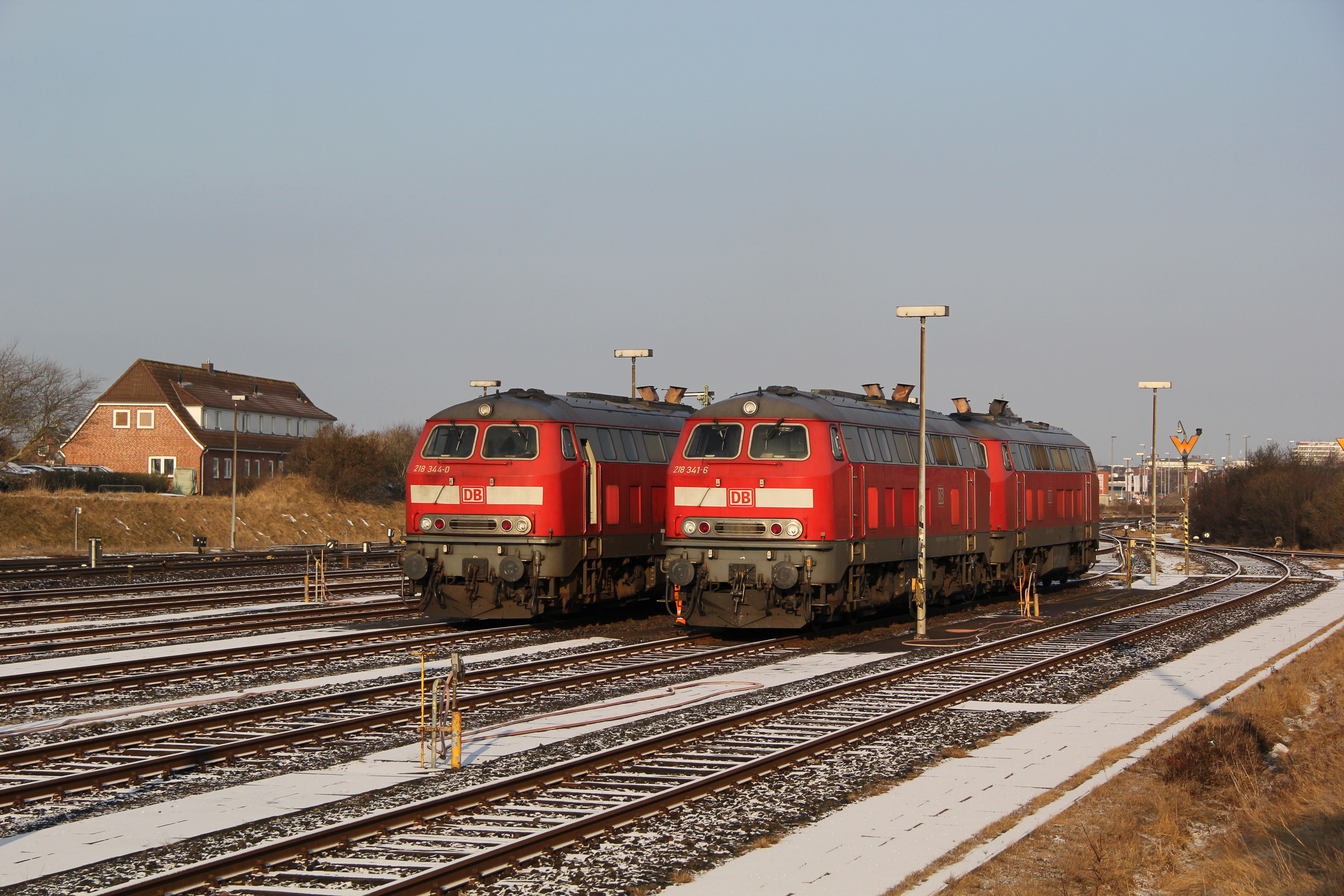 Westerland - Dieselloks by Niederkasseler